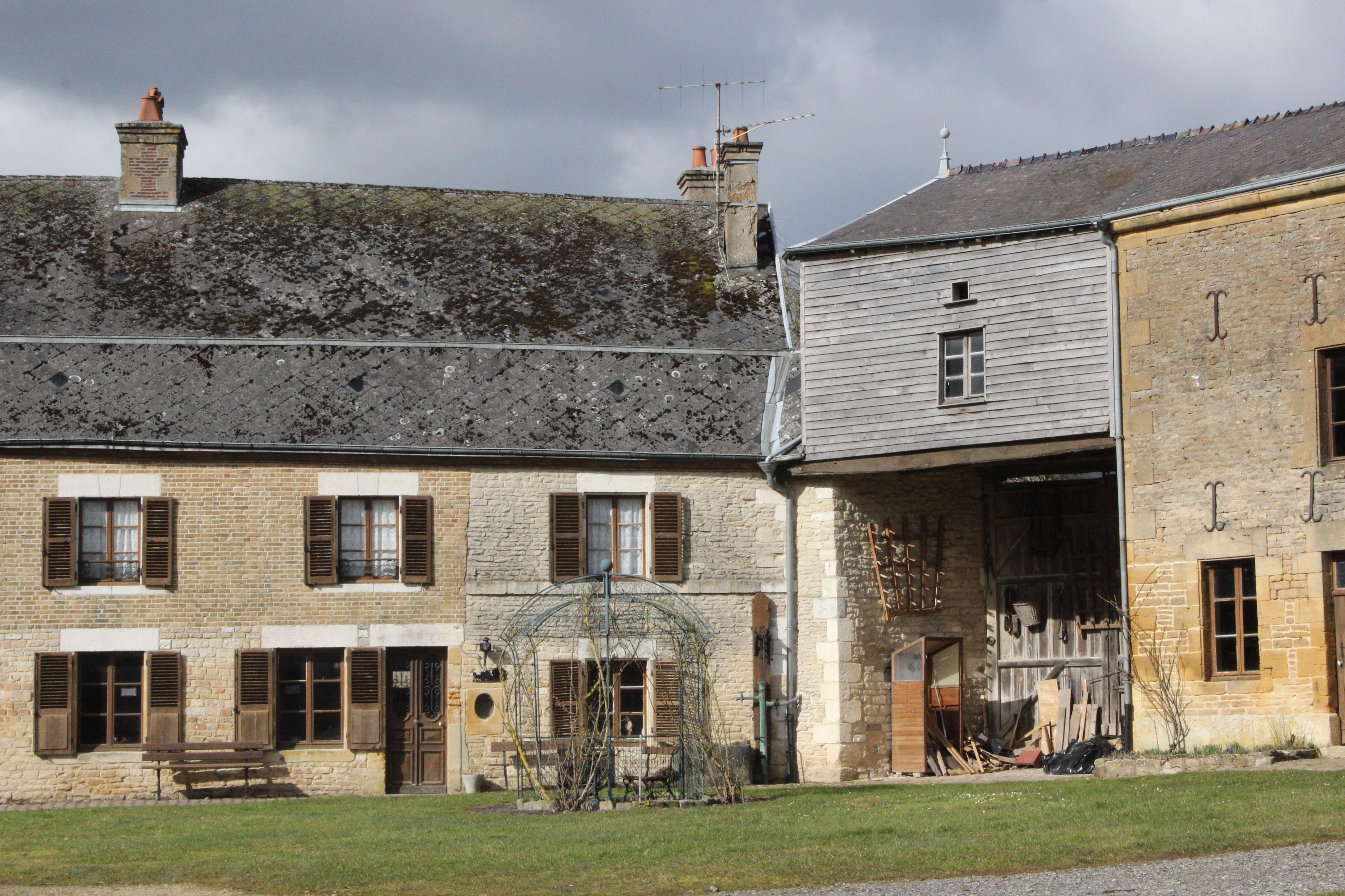 Launoy-sur-Vence, Ardennes, France. Ancien relais de la poste aux chevaux